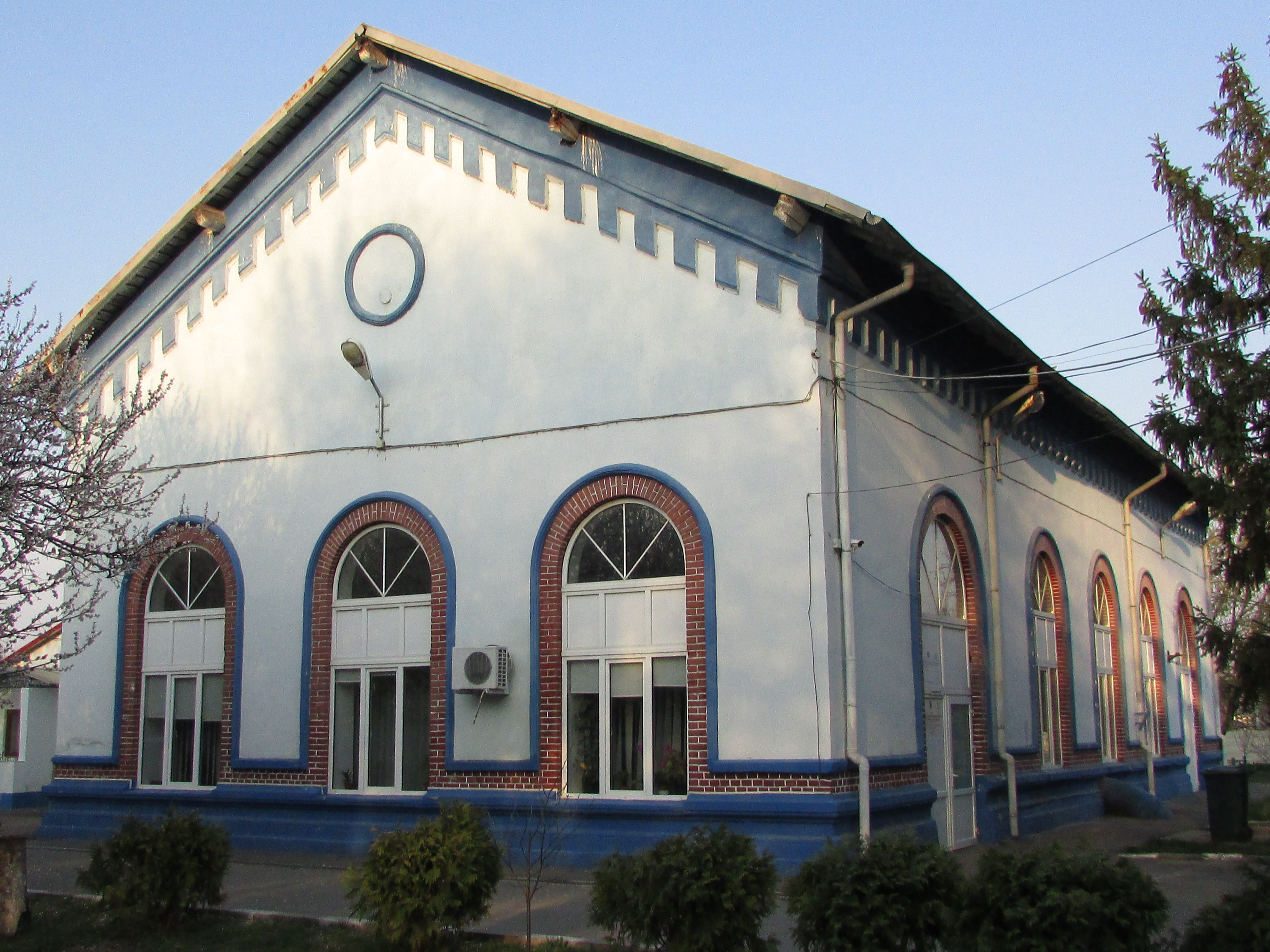 Uzina de apă